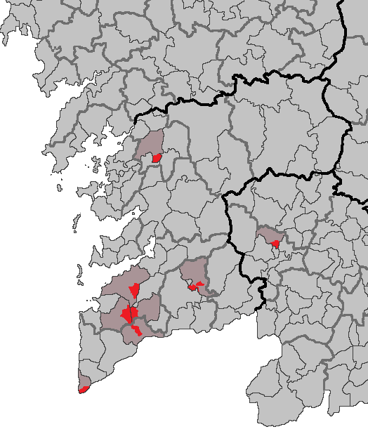 Entidades locais menores Galicia